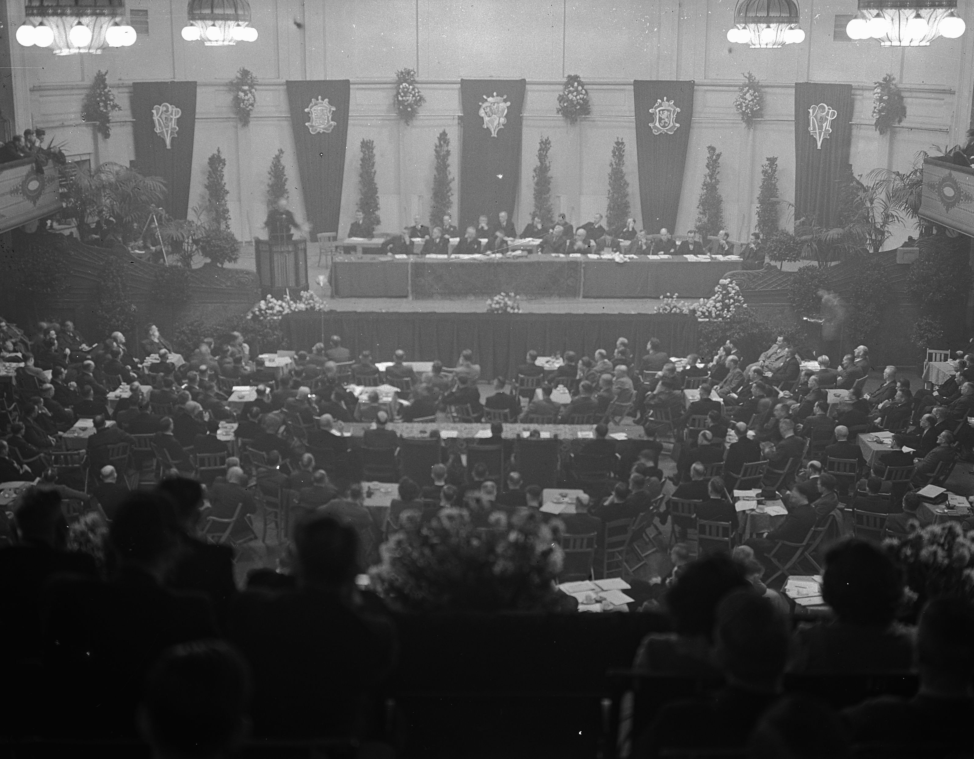 Collectie / Archief : Fotocollectie Anefo Reportage / Serie : [ onbekend ] Beschrijving : Congres KVP in "Tivoli" Utrecht Datum : 11 december 1948 Locatie : Utrecht Trefwoorden : congressen Instellingsnaam : KVP Fotograaf : Noske, J.D. / Anefo Auteursrechthebbende : Nationaal Archief Materiaalsoort : Glasnegatief Nummer archiefinventaris : bekijk toegang 2.24.01.09 Bestanddeelnummer : 903-1350